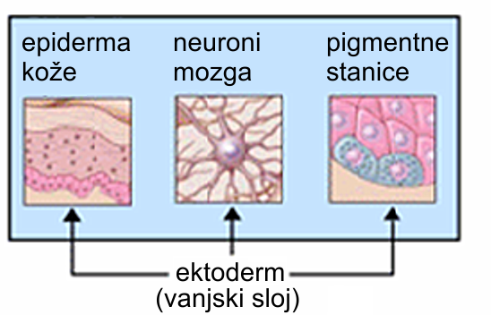 Ektoderm